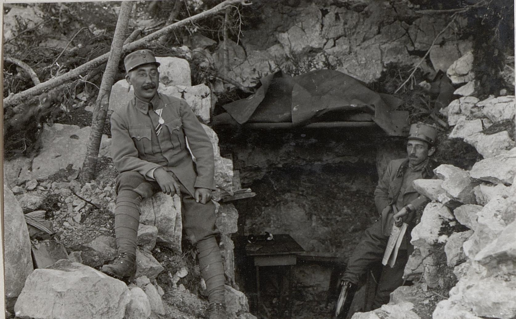 Kaverne am Bainsizza Plateau.26.9.17.